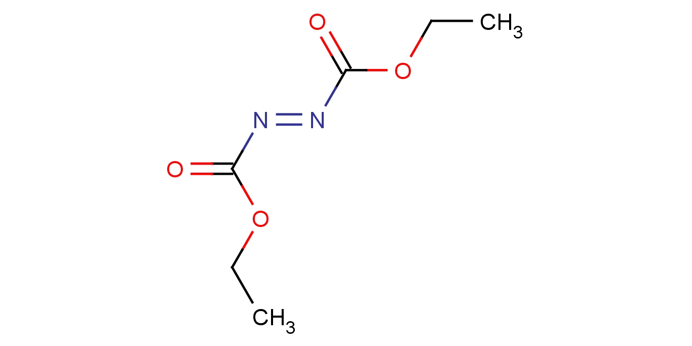 dietüülasodikarboksülaat.